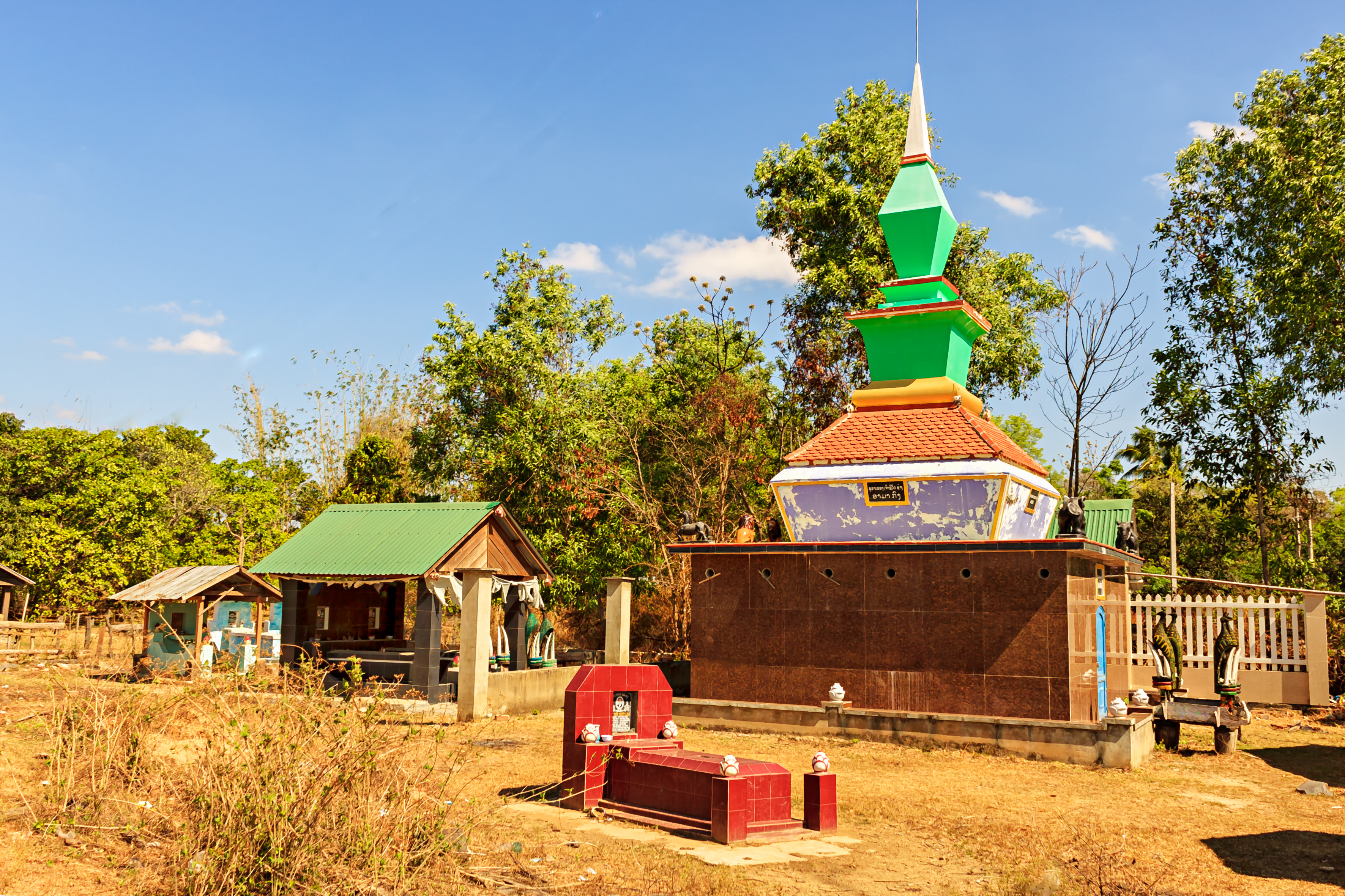 Mộ Ama Kông (có tháp nhọn) tại bản Đôn, xã Krông Na, huyện Buôn Đôn, tỉnh Đắk Lắk, Việt Nam.